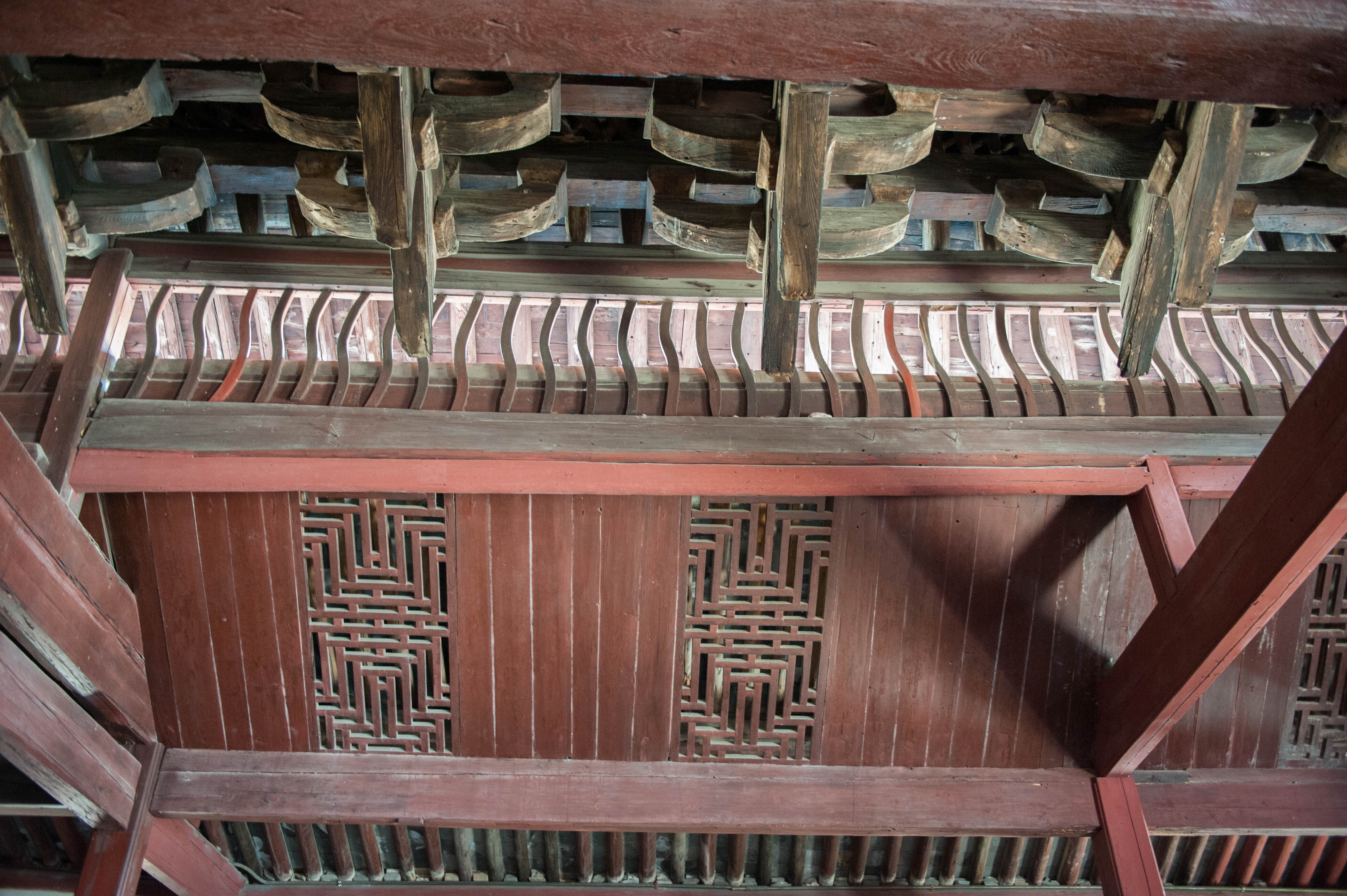 宁波保国寺